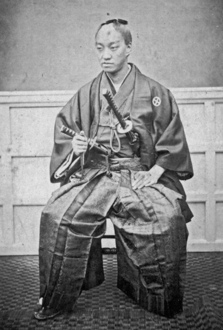 島津久治の肖像写真。